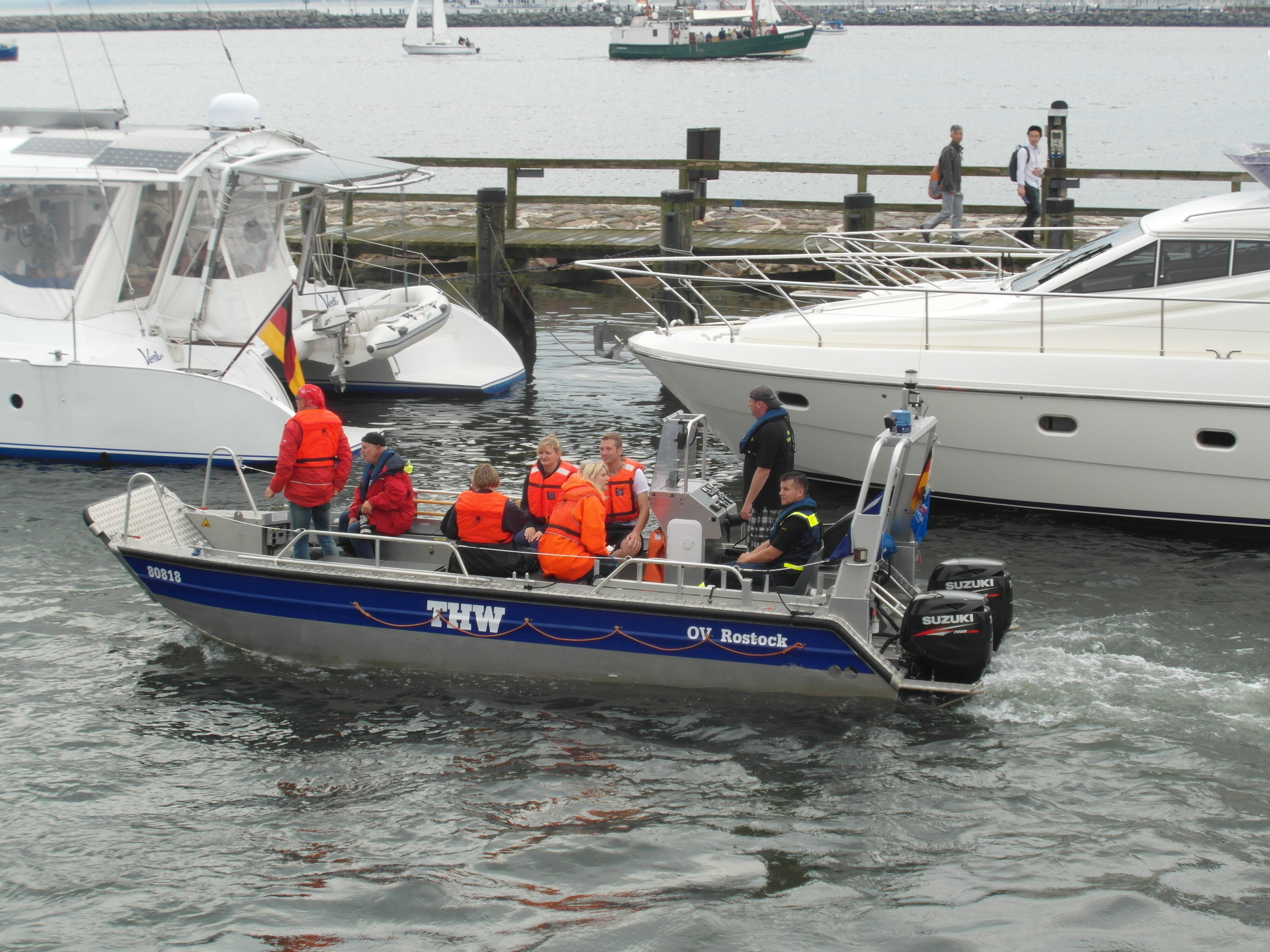 Mehrzweckboot (MZB) des THW-Ortsverbandes Rostock